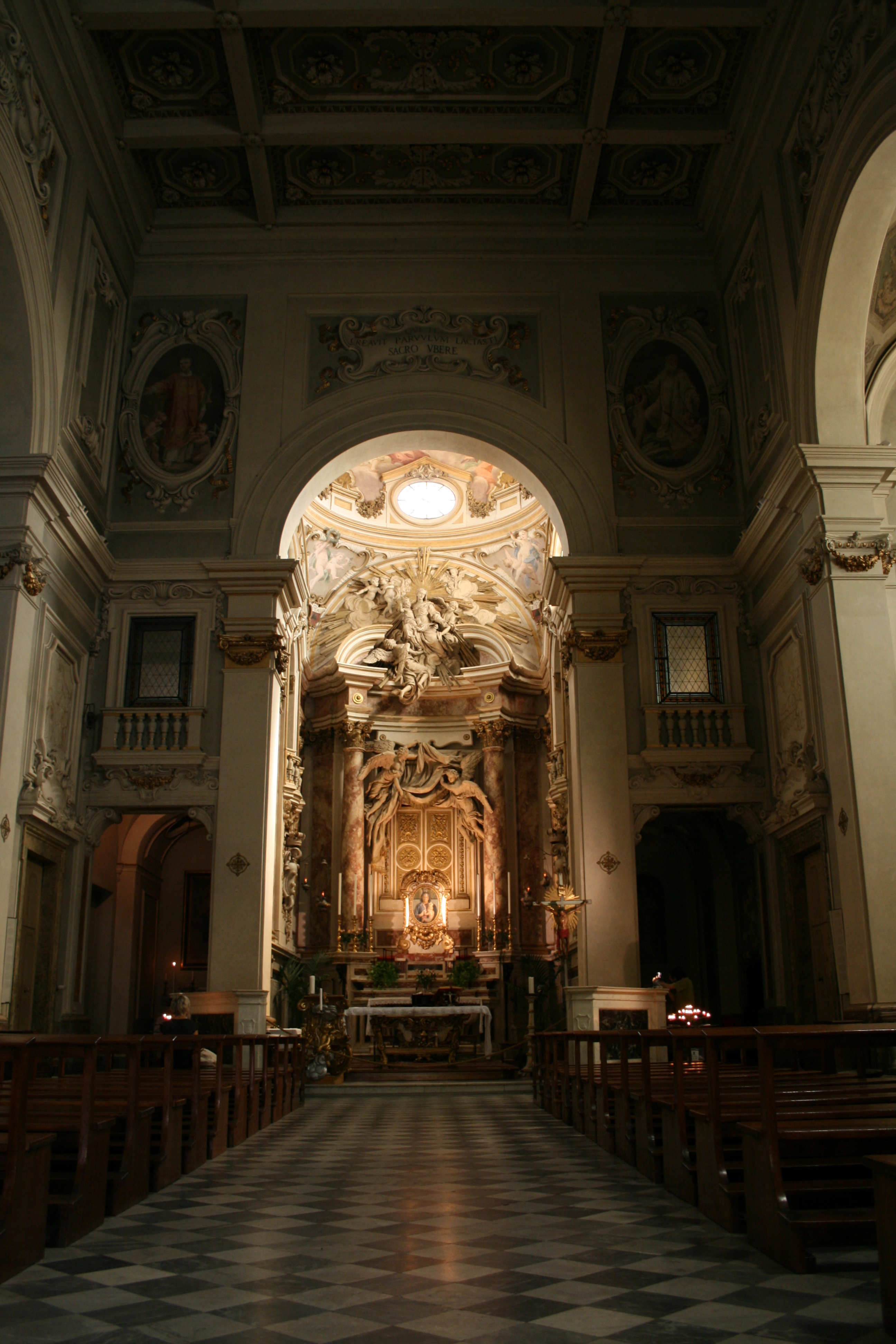 Interiors